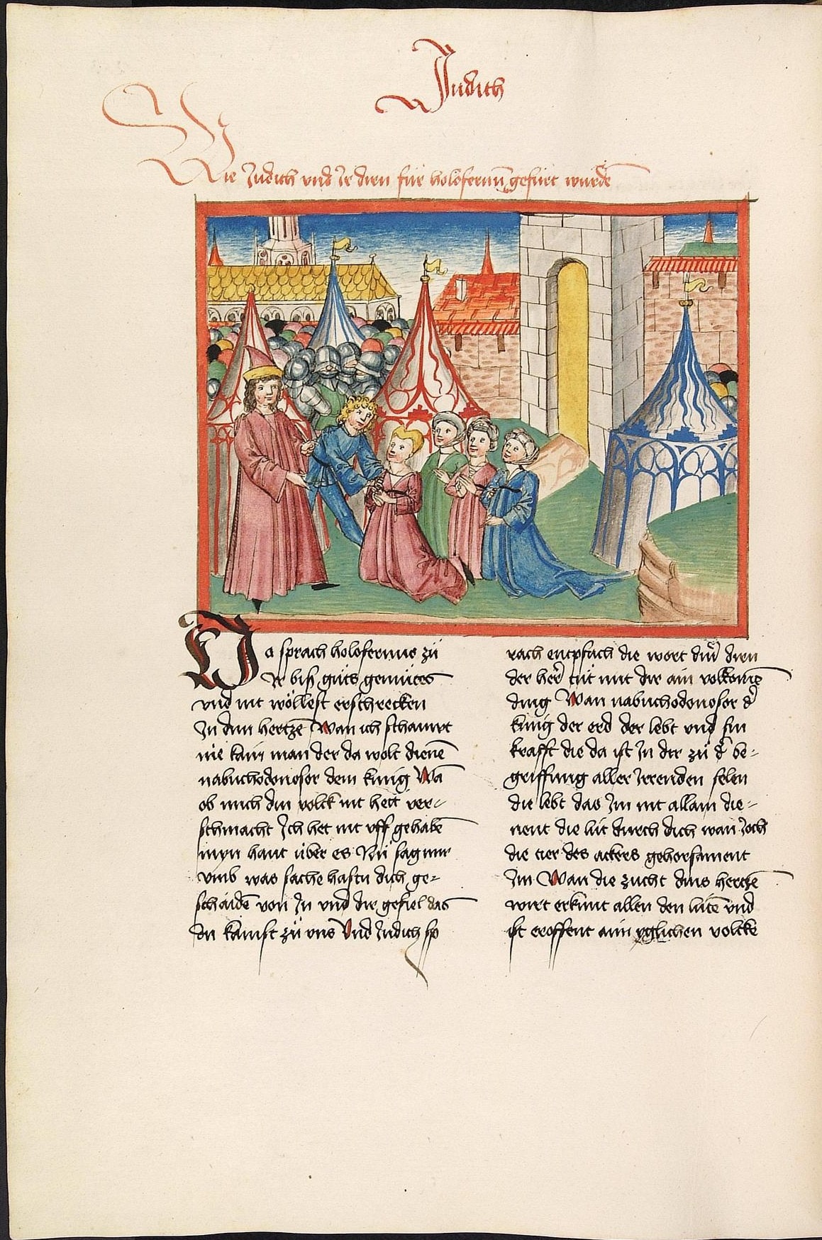 Codex Palatinus germanicus 17, Blatt 253v - Bibel, Altes Testament, Buch Judit: Judith kniet mit gefalteten Händen und in Begleitung von drei ihrer Dienstmädchen, vor Holofernes. (Cpg 17 = Bibel AT, deutsch, Bücher Könige, Chroniken, Esra, Tobias, Judit, Ester, Hiob)